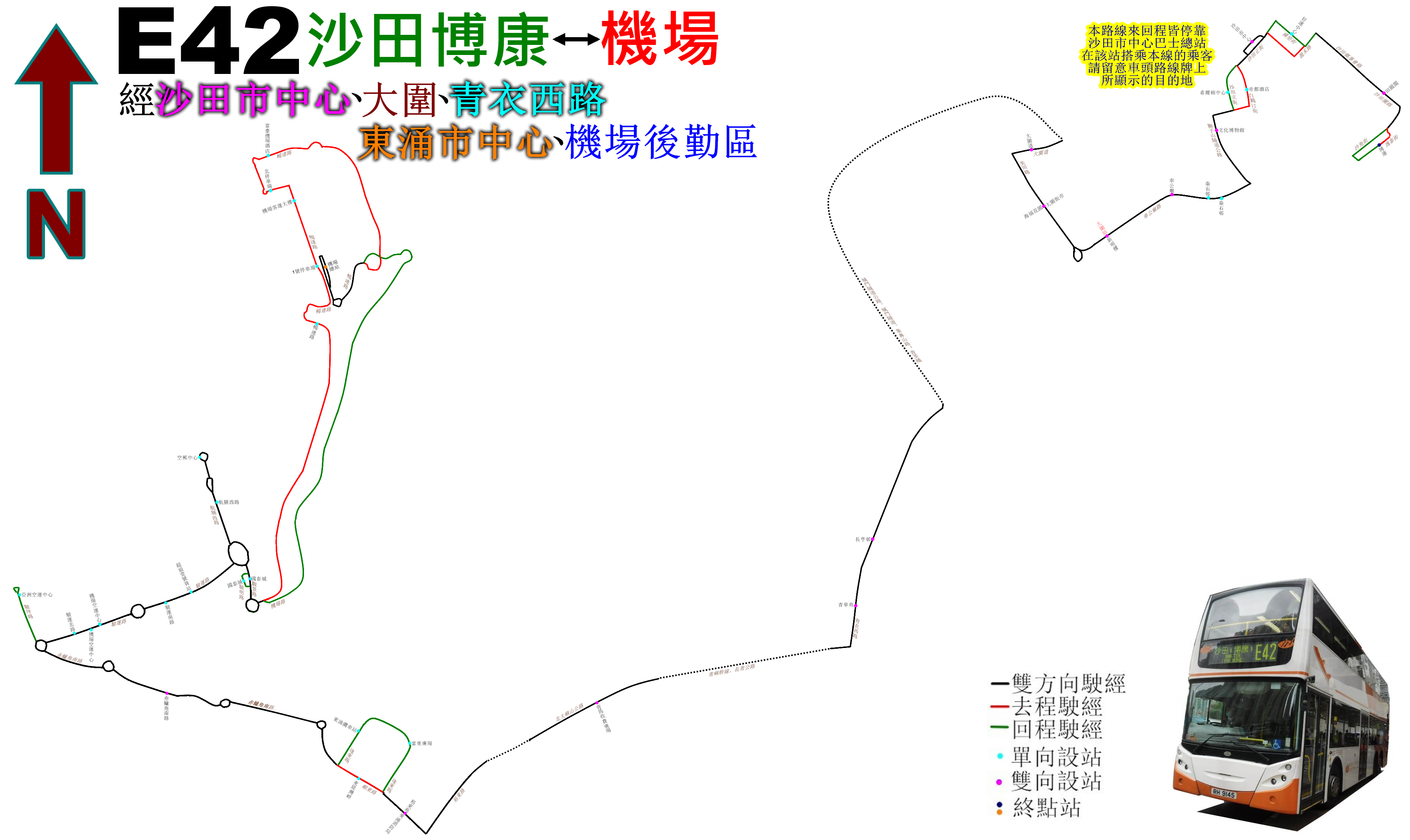 中文（香港）: 龍運巴士E42線的走線圖